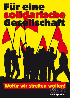 Plakat zum 35. Parteitag der KPÖ